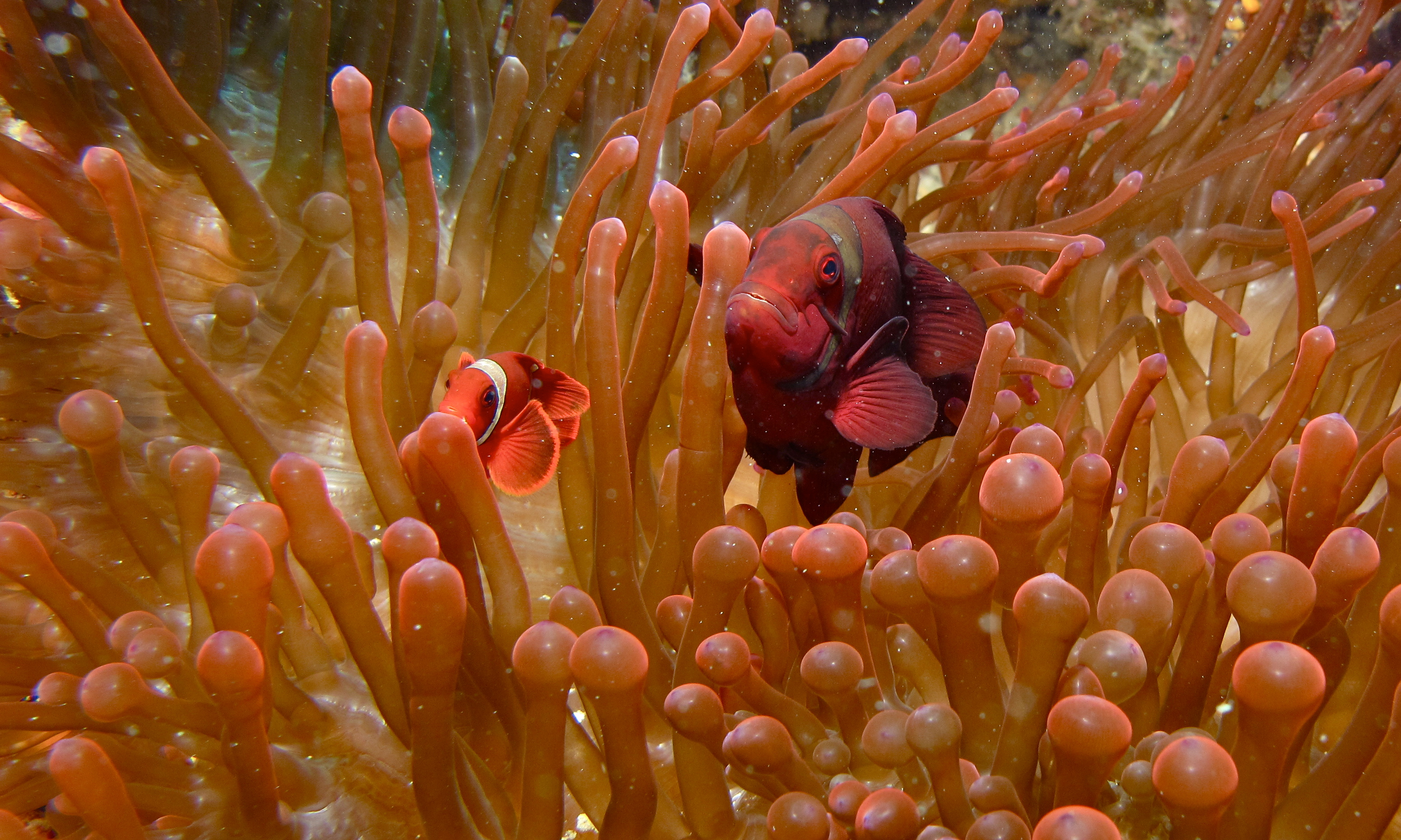 Premnas biaculeatus, pareja en Entacmaea quadricolor, Sipadan Malasia